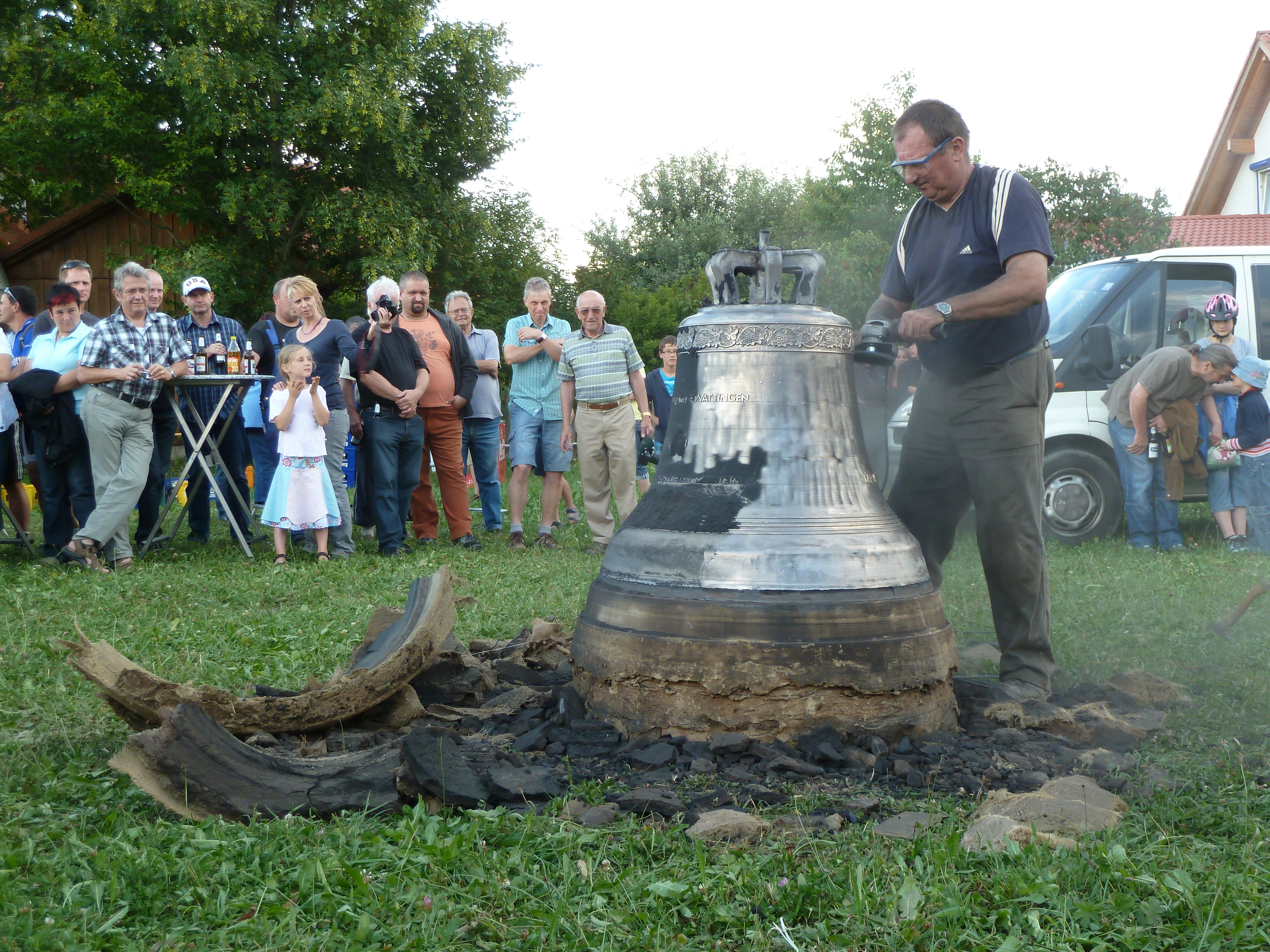 Glockenguss in Ewattingen mit Bruder Michael Reuter von der Abtei Maria Laach